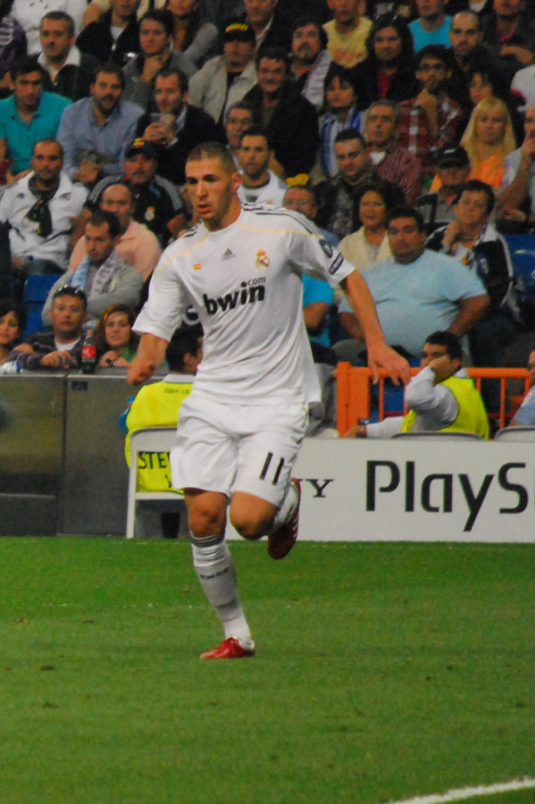 Champions League Real Madrid 3 - O.Marsella 0 30/09/09 Karim Benzema